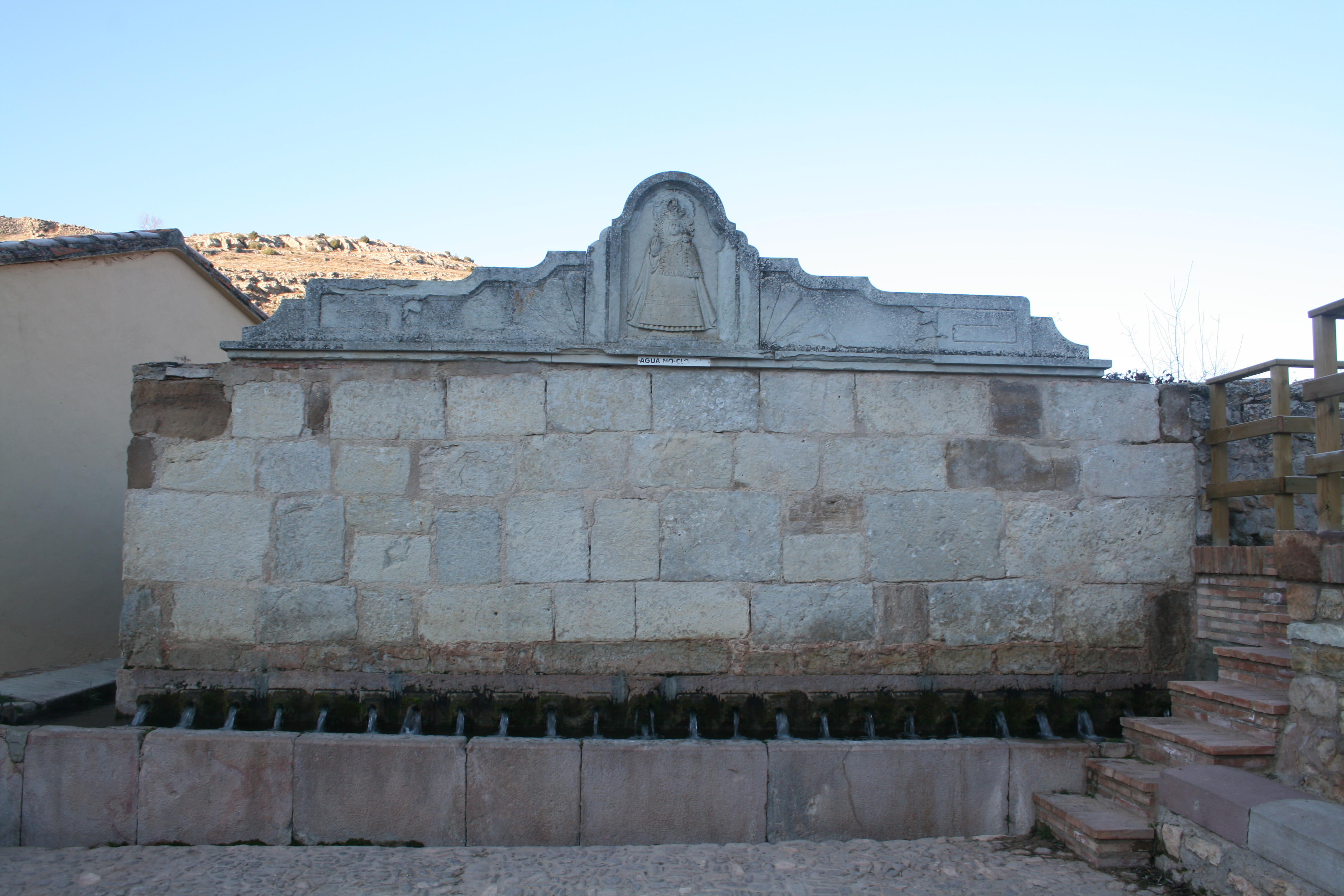 Fuente de los Caños, Bijuesca, España